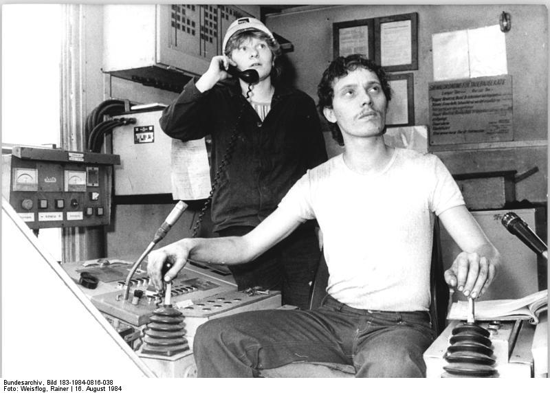 Tagebau Greifenhain, Jugendbrigade "Ho Chi Min" ADN-ZB Weisflog 16.8.84 Bez. Cottbus: Bestleistungen zum Weltfriedenstag- Ihre Hochleistungsschichten zum Weltfriedenstag leisteten die drei Schichtbesatzungen des Abraumbaggers SRs 6 300 im Tagebau Greifenhain. Sie haben sich das Ziel gestellt, 190.000 Kubikmeter Abraum zu bewegen - also 50.000 Kubikmeter mehr, als sonst in drei Schichten geschafft wurden. Voraussetzungen dafür sind eine gute Arbeitsorganisation und der persönliche Einsatz eines jeden Einzelnen. Die erreichten Ergebnisse wollen die Kumpel künftig zur Norm werden lassen. Links Maschinistin Doris Richter, Baggerfahrer Heiner Wittich von der Jugendbrigade "Ho Chi Min".